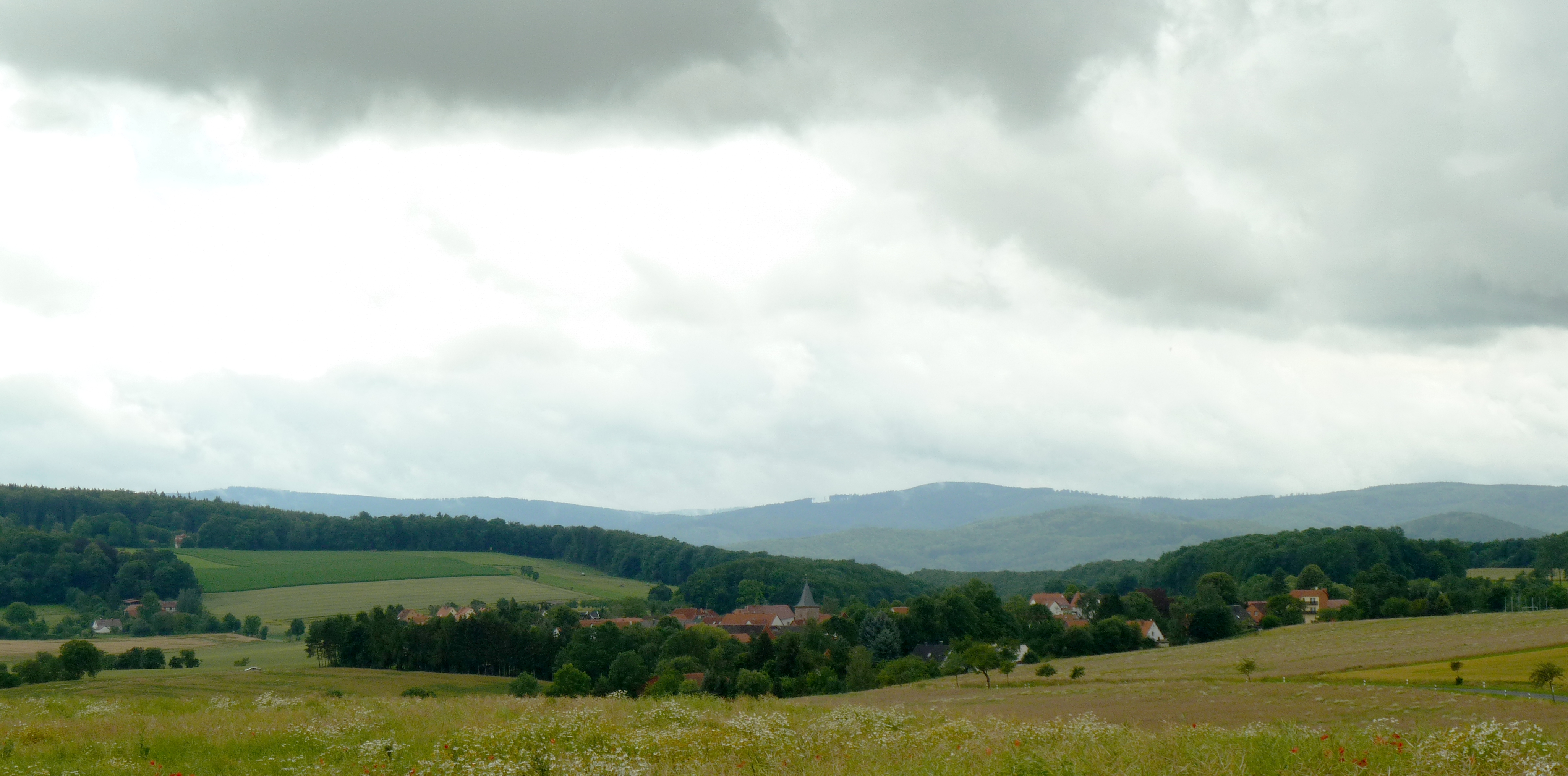 Blick von Nordosten auf Mollenfelde, Gemeinde Friedland, Südniedersachsen. Ganz links das Forsthaus Mollenfelde mit Ausläufern des Sandwaldes, im Hintergrund der Kaufunger Wald